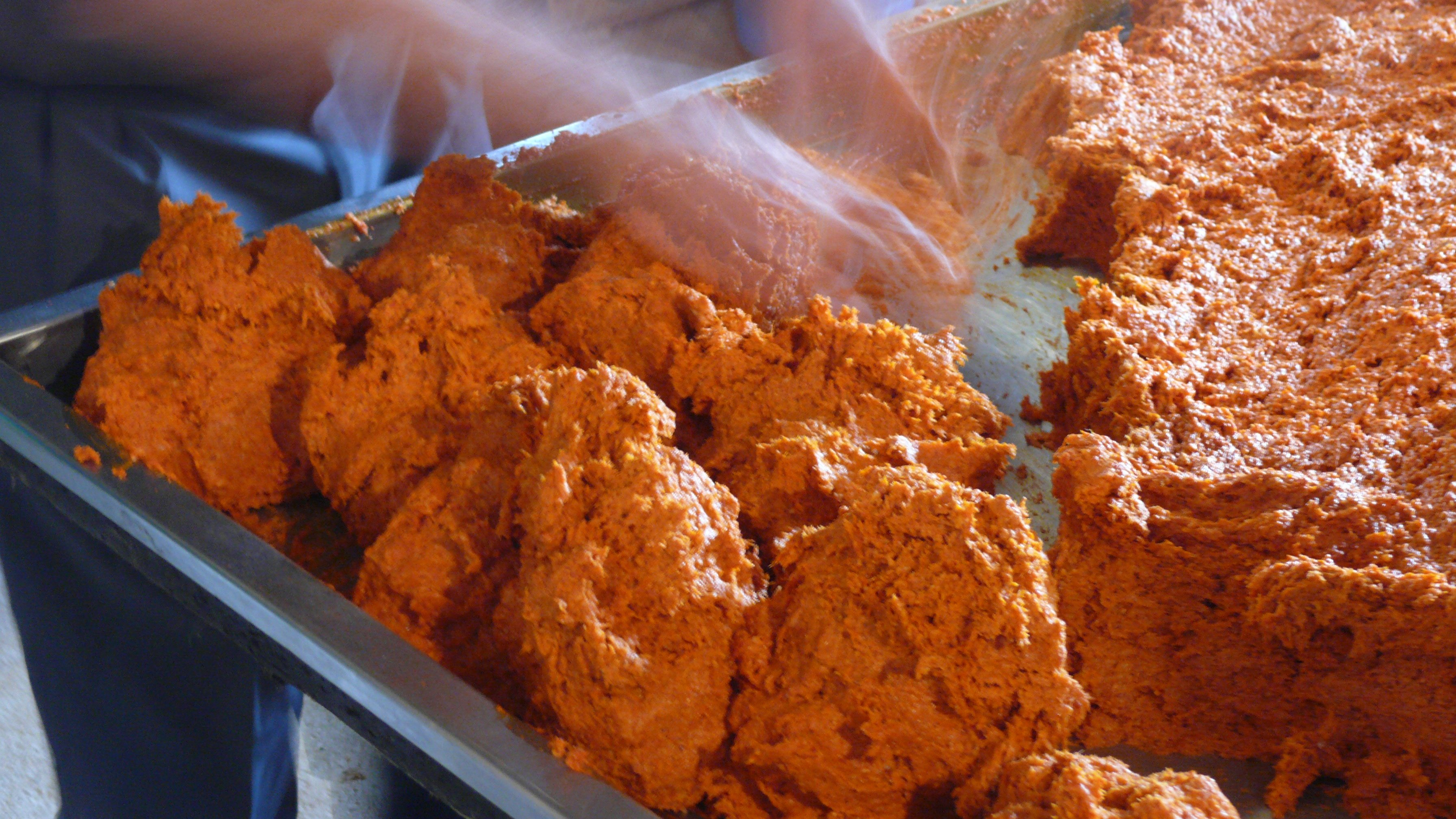 Algú preparant sobrassada per a posar-la dins els budells del porc.